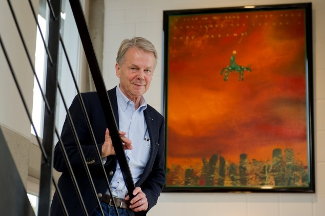 Hansjochen Schwieger (*13. August 1945 in Radeberg) ist ein deutscher Architekt